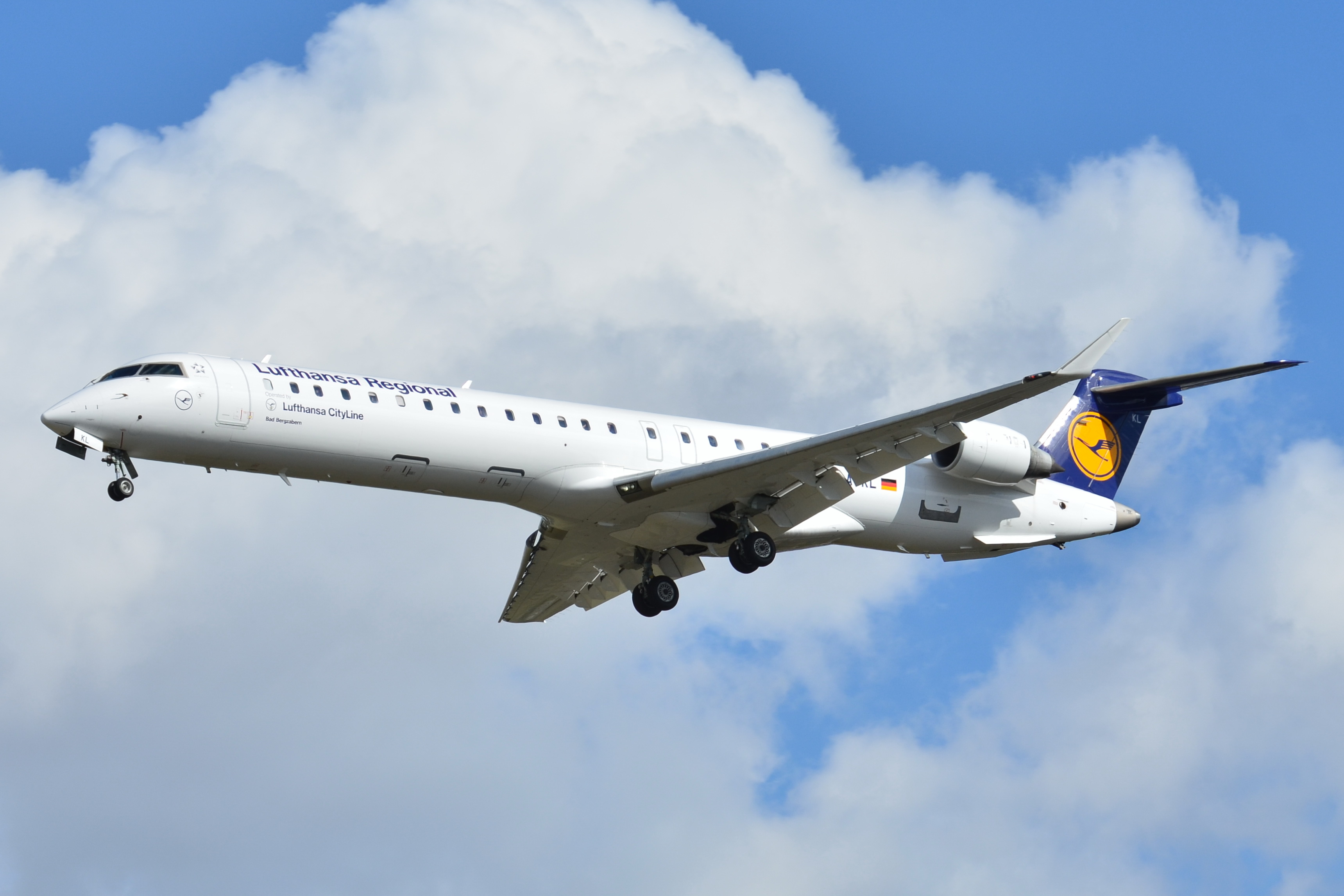 Photo prise à l'aéroport de Toulouse-Blagnac (LFBO) en France. Picture take at Toulouse-Blagnac Airport (LFBO) in France.